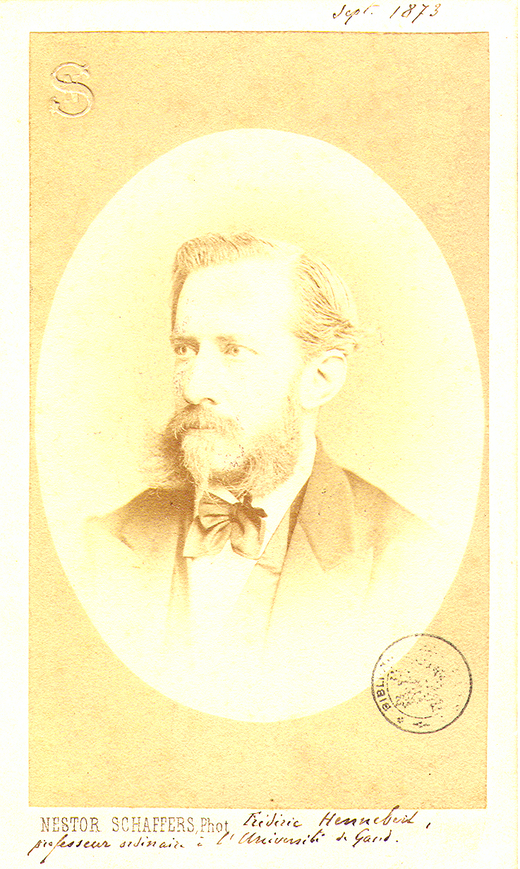 Portret van Frédéric Hennebert (1837-1873), hoogleraar aan de Faculteit Letteren en Wijsbegeerte te Gent